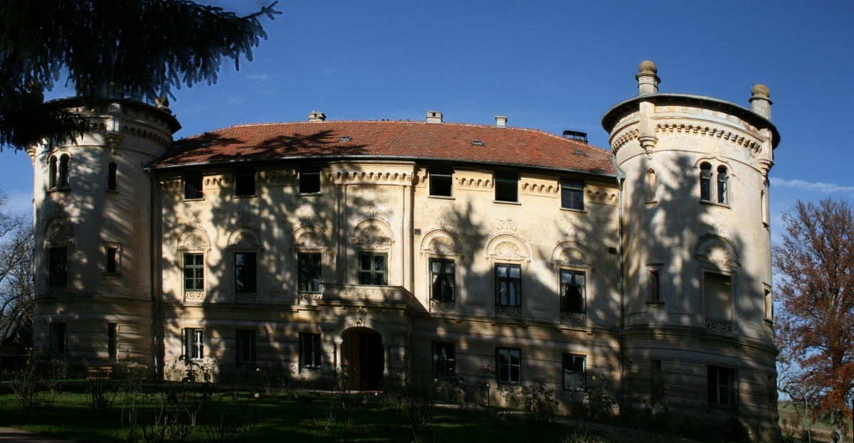 Utvrda/samostan Lovrečina grad